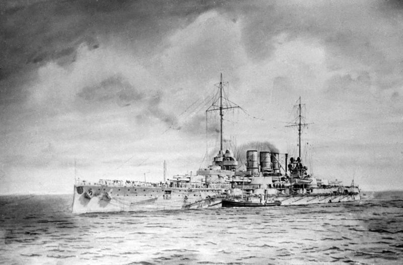 Linienschiff "SMS Ostfriesland" Linienschiff "S.M.S. Ostfriesland" der Helgoland-Klasse auf See, Ansicht der Backbord-Seite